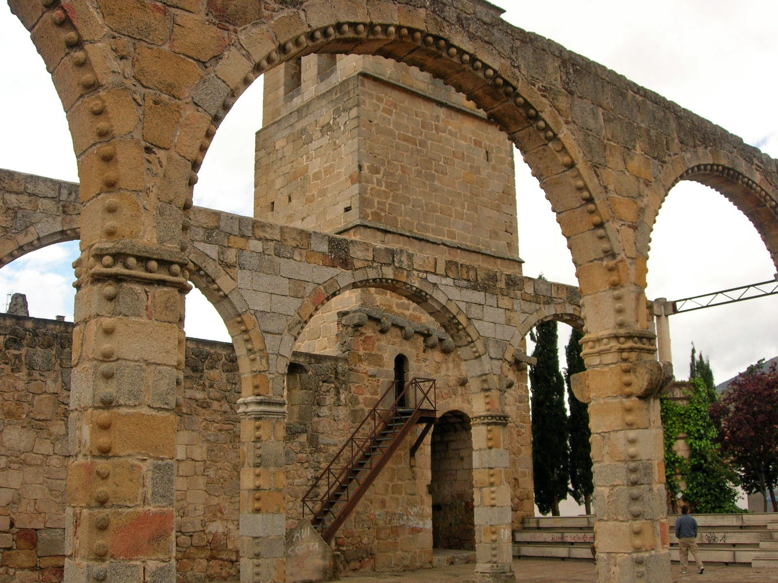 iglesia en cebreros